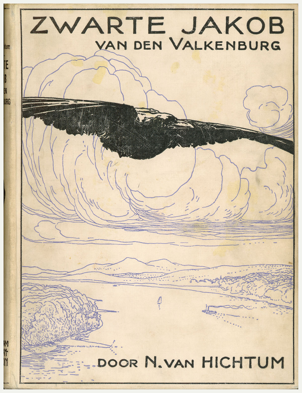 Boekomslag: Zwarte Jakob van den Valkenburg : een ware geschiedenis met teekeningen van L.W.R. Wenckebach. Auteur: Hichtum, Nynke van (pseud. van Troelstra-Bokma de Boer, S.M.D.). Bandontwerp: L.W.R. Wenckebach. Uitgeverij: P.N. van Kampen & Zoon